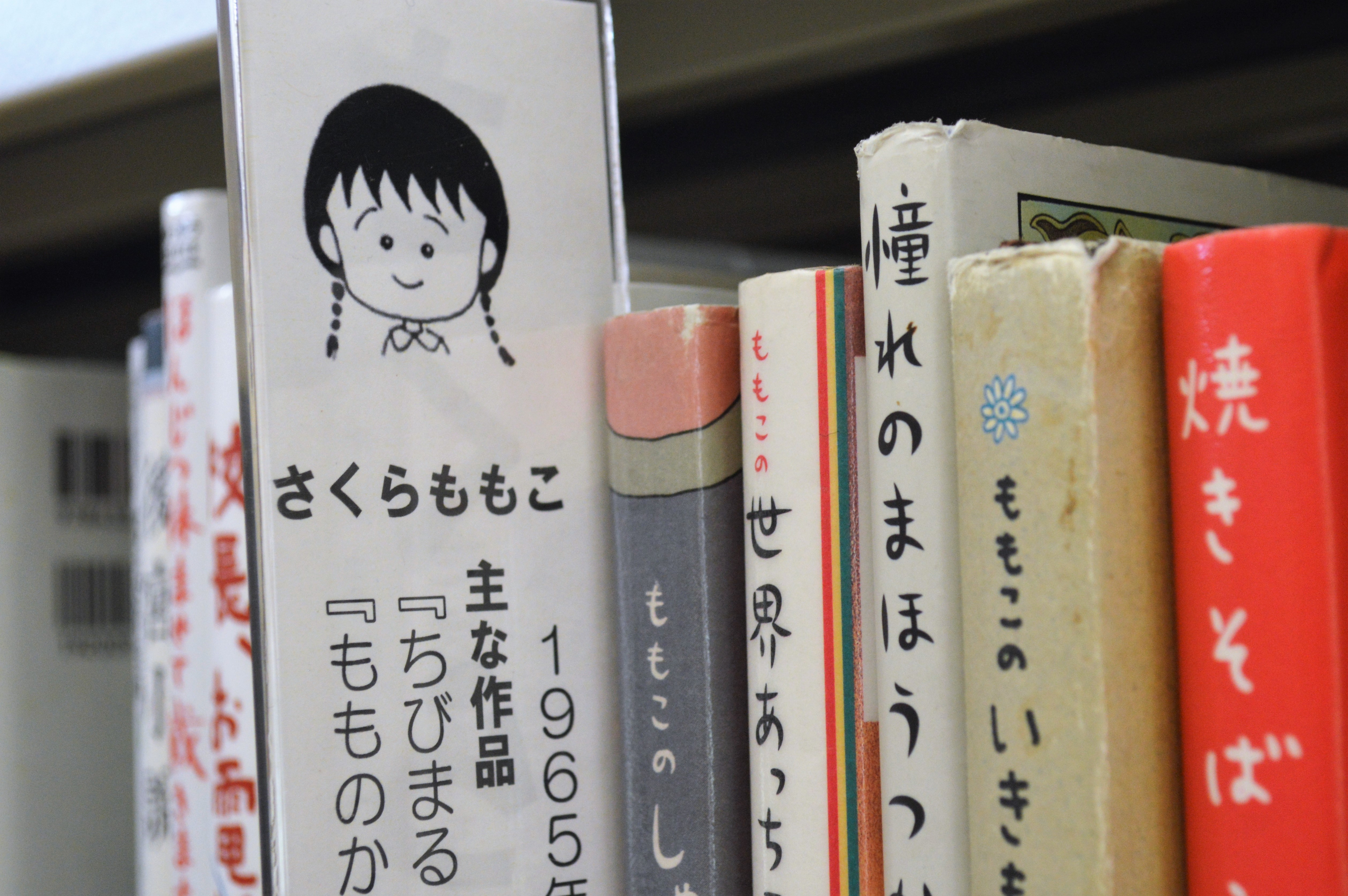 長野県北安曇郡の松川村図書館。